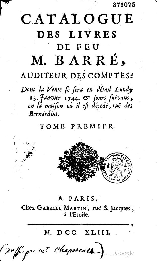 Catalogue des livres de feu M. Barré, auditeur des comptes. Paris, 1743, 2 volumes. Lyon BM.